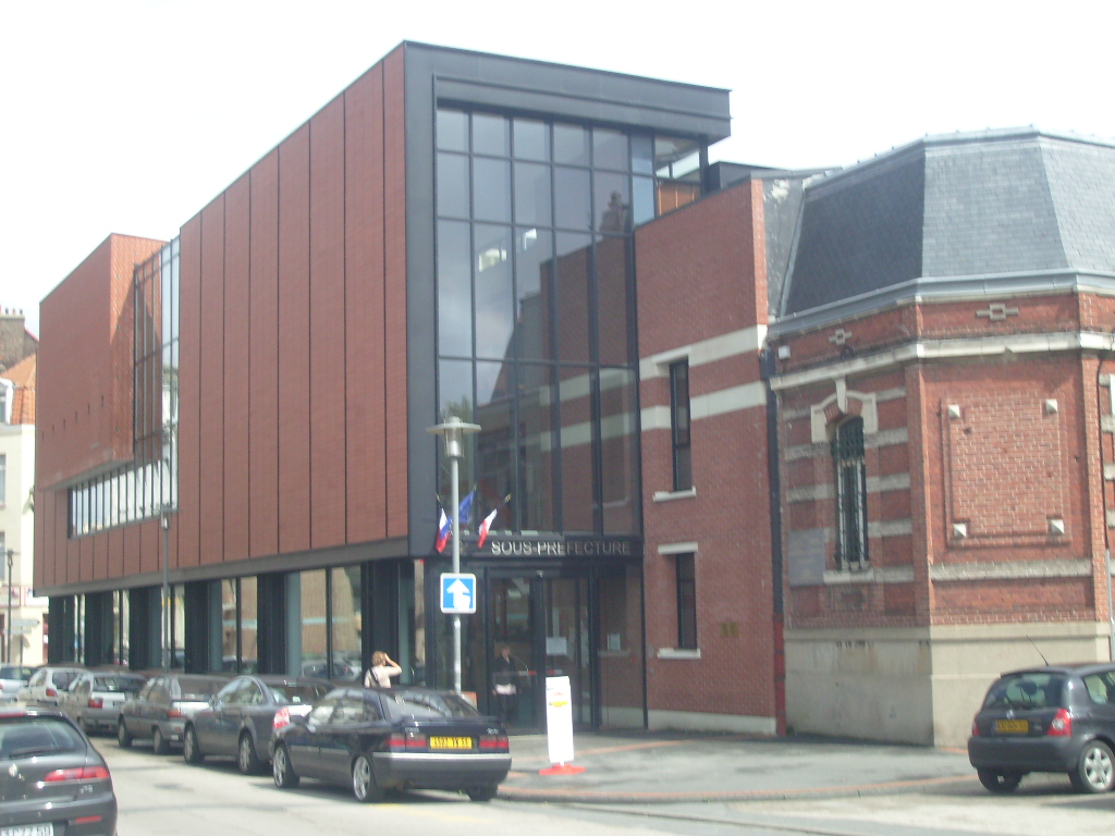 La sous-prefecture de Dunkerque